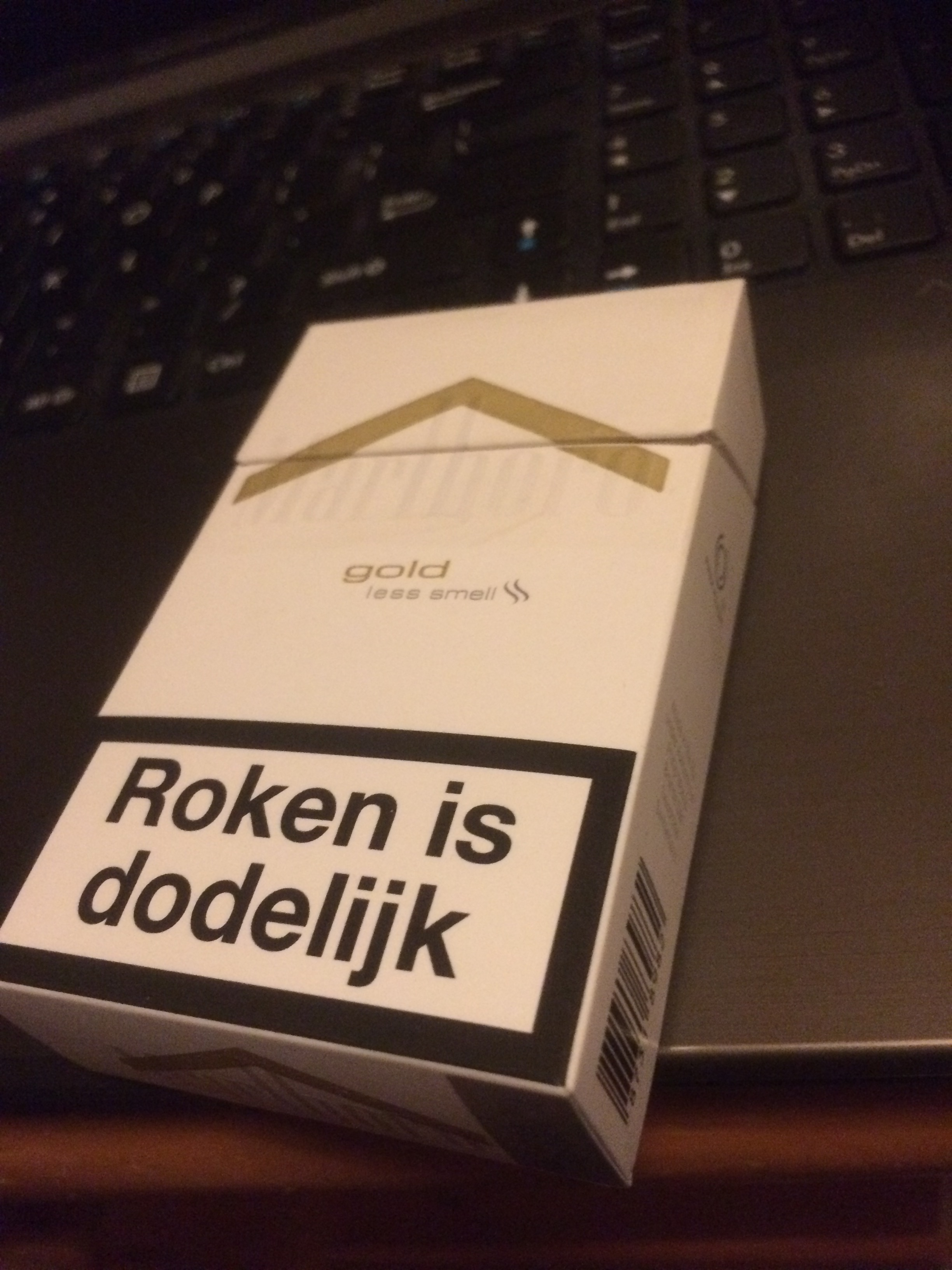 Pack of Marlboro gold with dutch warning text